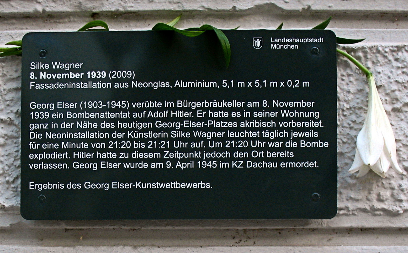 Deutschland, Bayern, München, Gebäudeschild, Georg-Elser-Denkmal